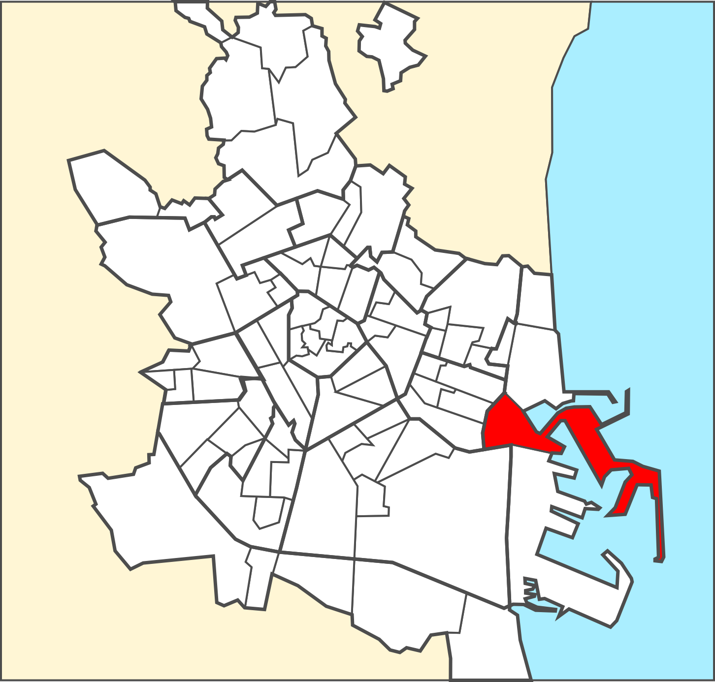 Localització del barri dins de la ciutat de València.